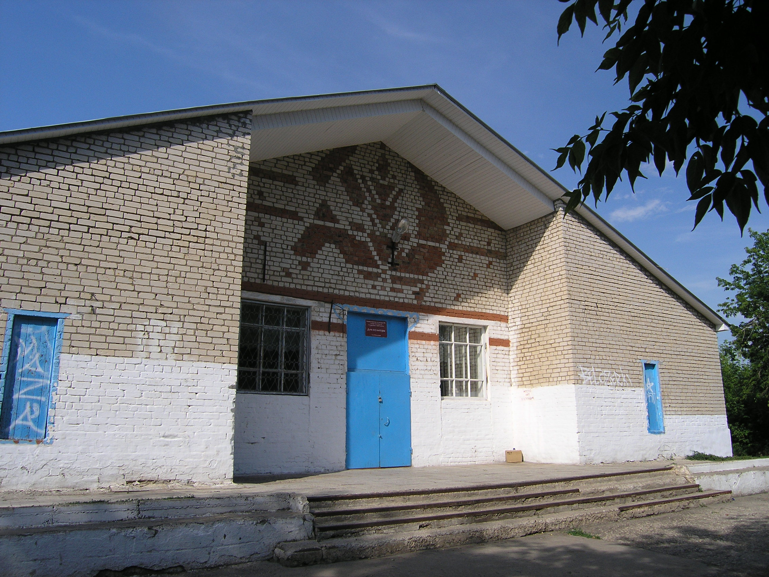 Здание Дома Культуры, Верхние Белозёрки, Ставропольский район, Самарская область, Россия